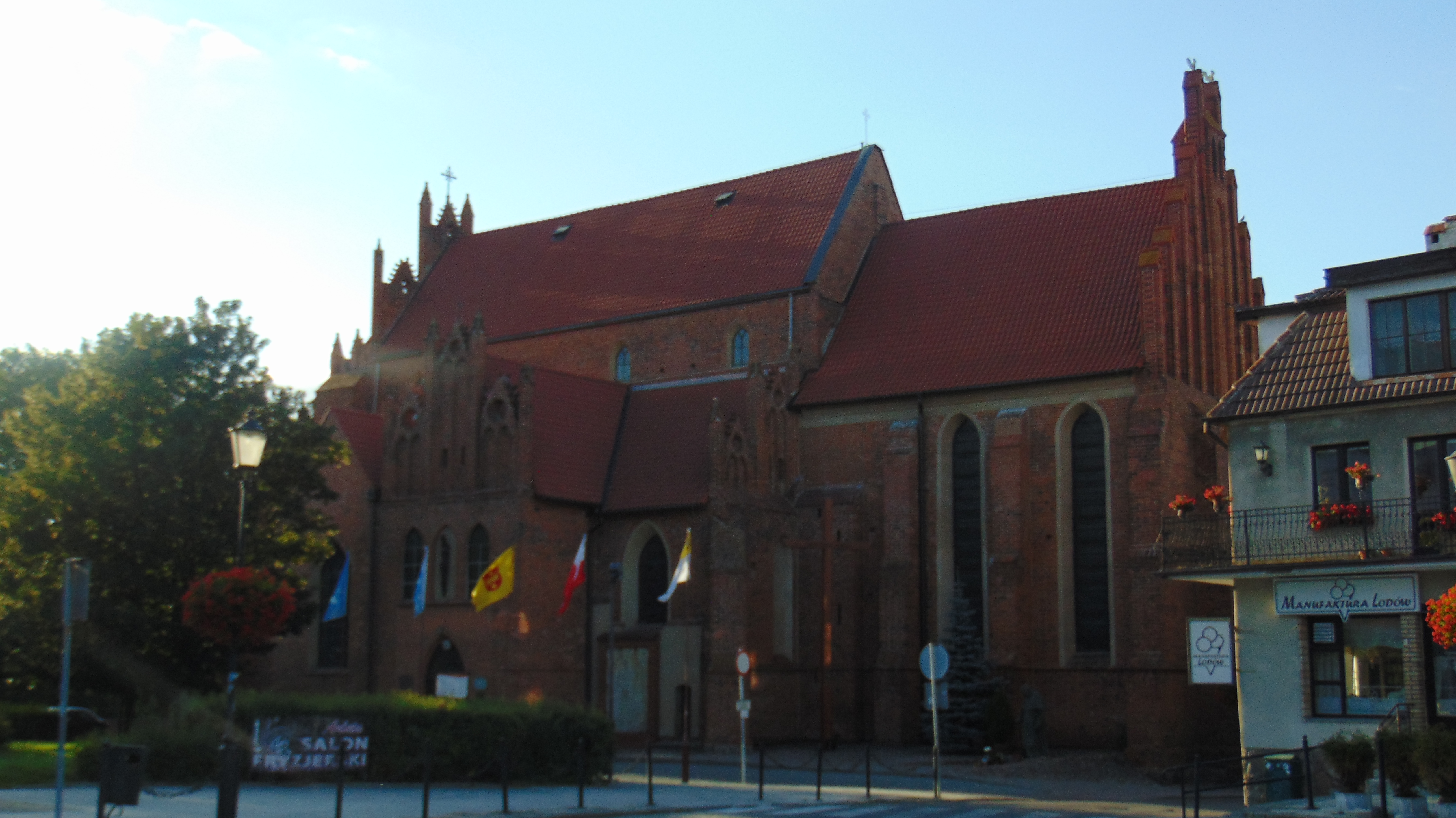 Kościół na starogardzkim rynku